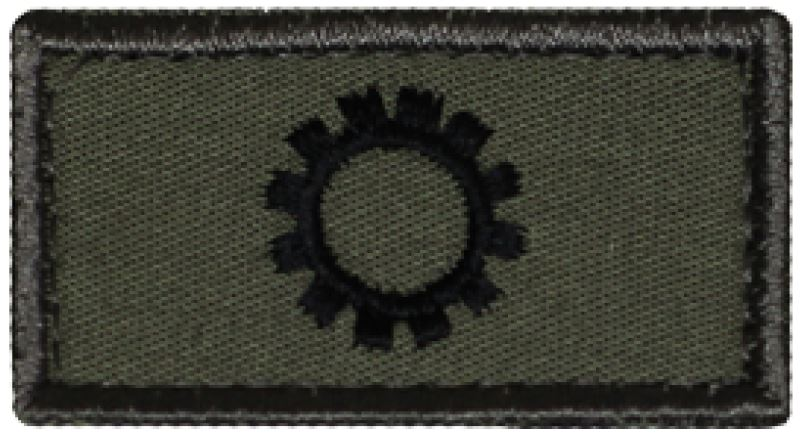 Materialwart Abzeichen